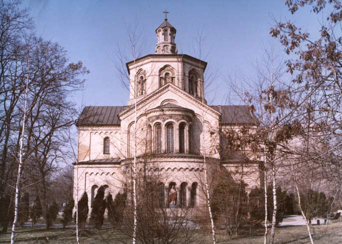 St. Spirit Polish Catholic Church Catedral in Warsaw Katedra Kościoła Polskokatolickiego pw. Świętego Ducha w Warszawie